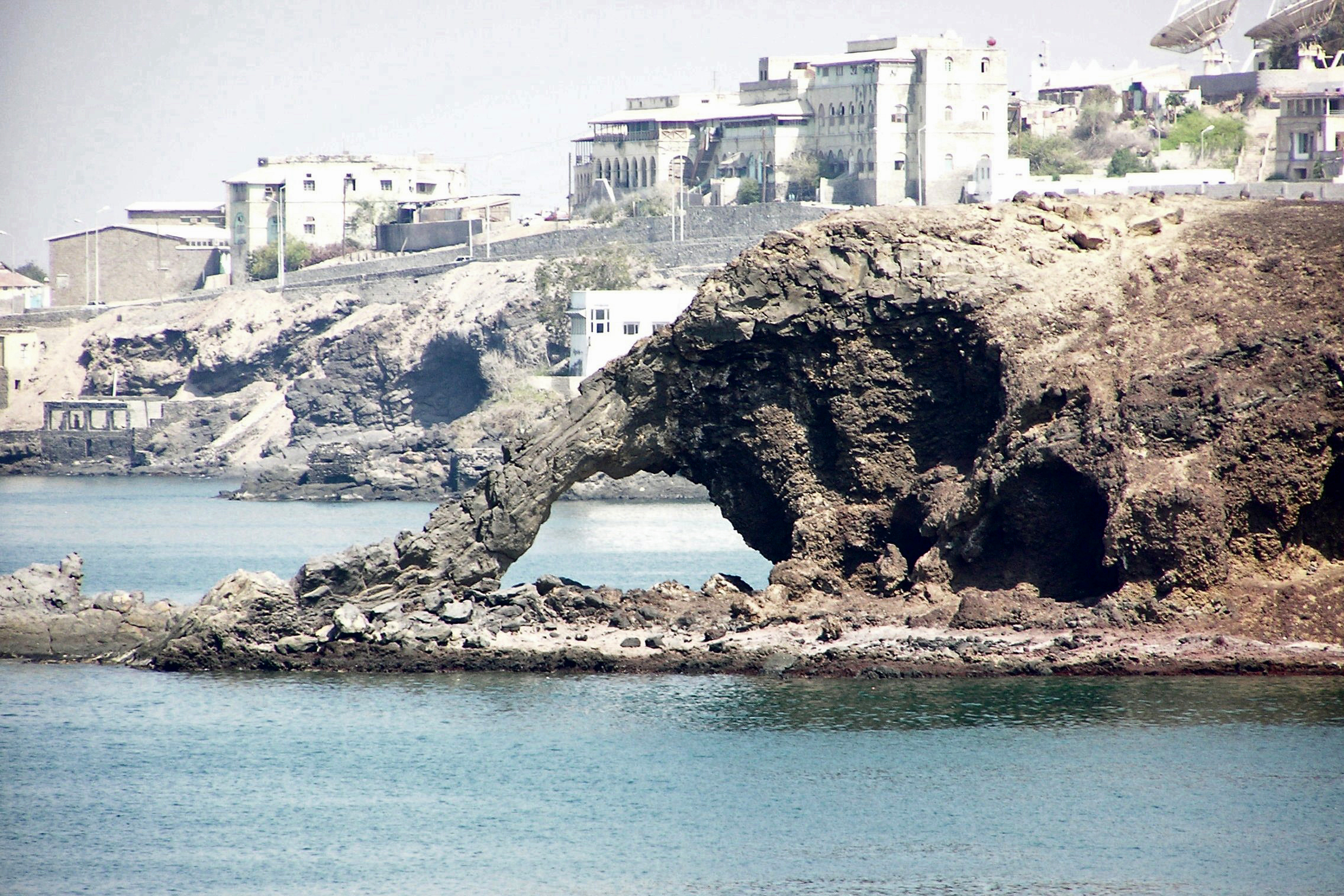 Elephant-rock dans la baie de Gold Mohur à Aden (Yémen)